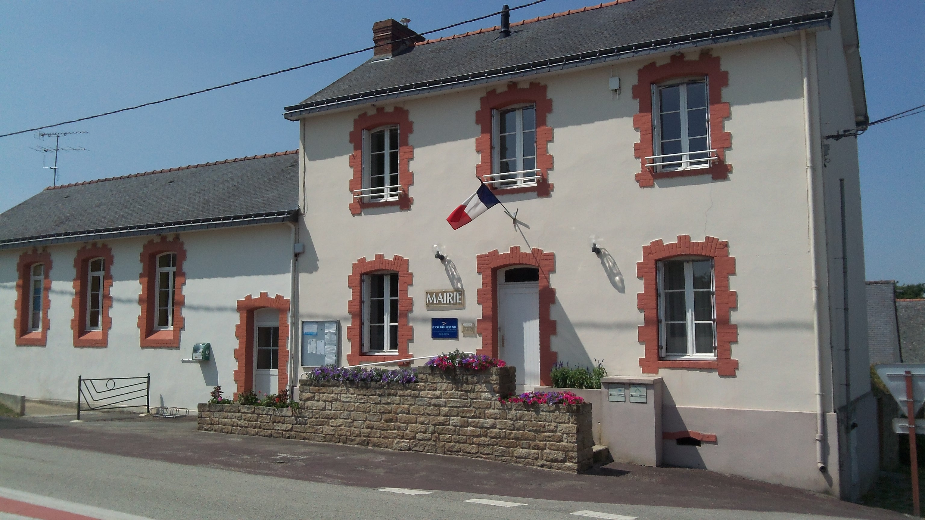 Mairie de la commune de Gourhel, dans le Canton de Ploërmel.